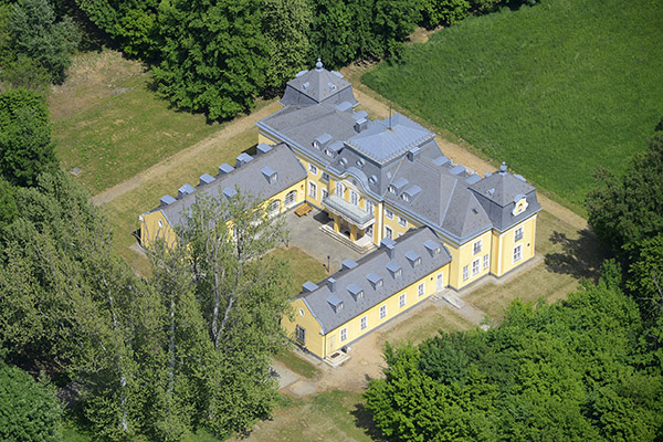 Friss légifotók a Széchenyi-kastélyról